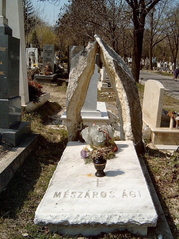 Mészáros Ági (1918. május 24. Budapest - 1989. március 8. Budapest) színművész sírja Budapesten. Farkasréti temető: 22/1-1-5.